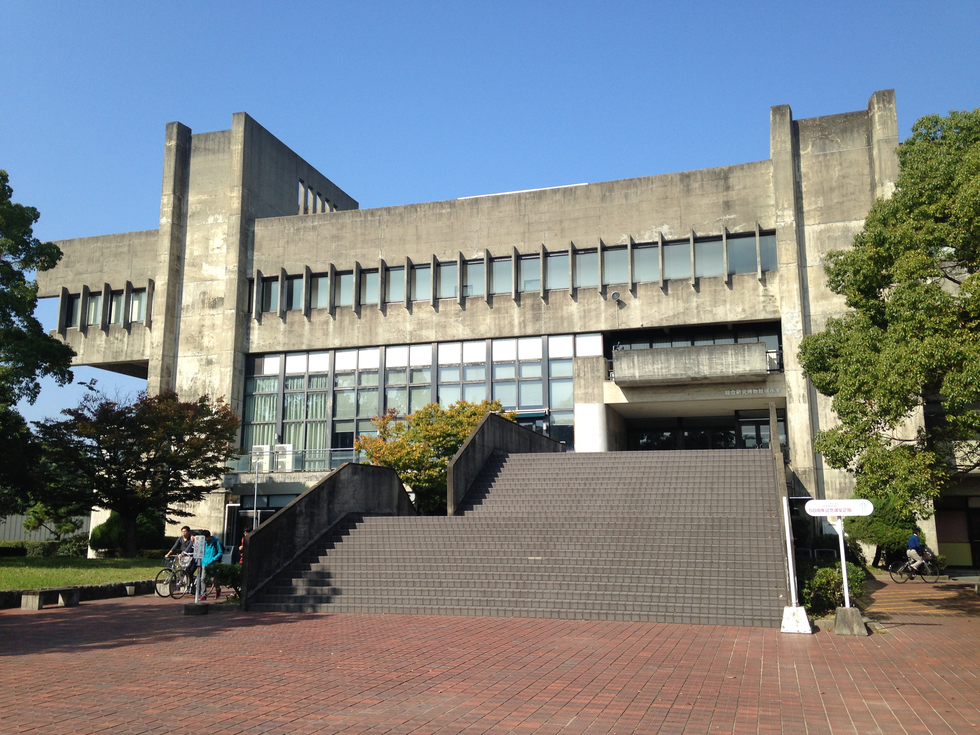 九州大学箱崎キャンパス・総合研究博物館